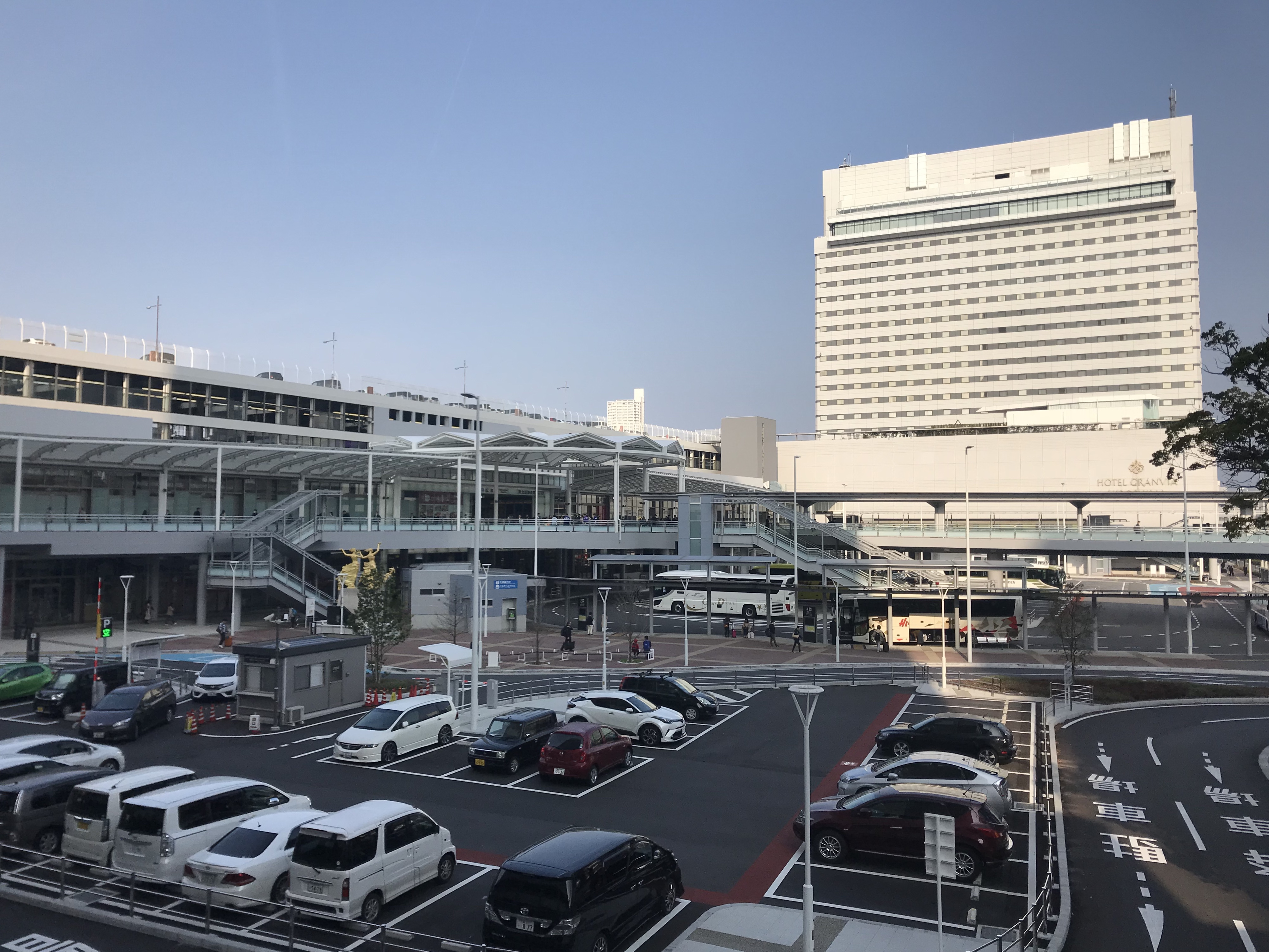 広島駅新幹線口の遠景